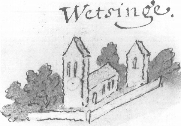 Uitsnede van de kaart van Regemortes van de Afsnijding van de Raken bij Garnwerd (Groninger Archieven: archieftoegang T817-1578). De kerk heeft hier twee torens.